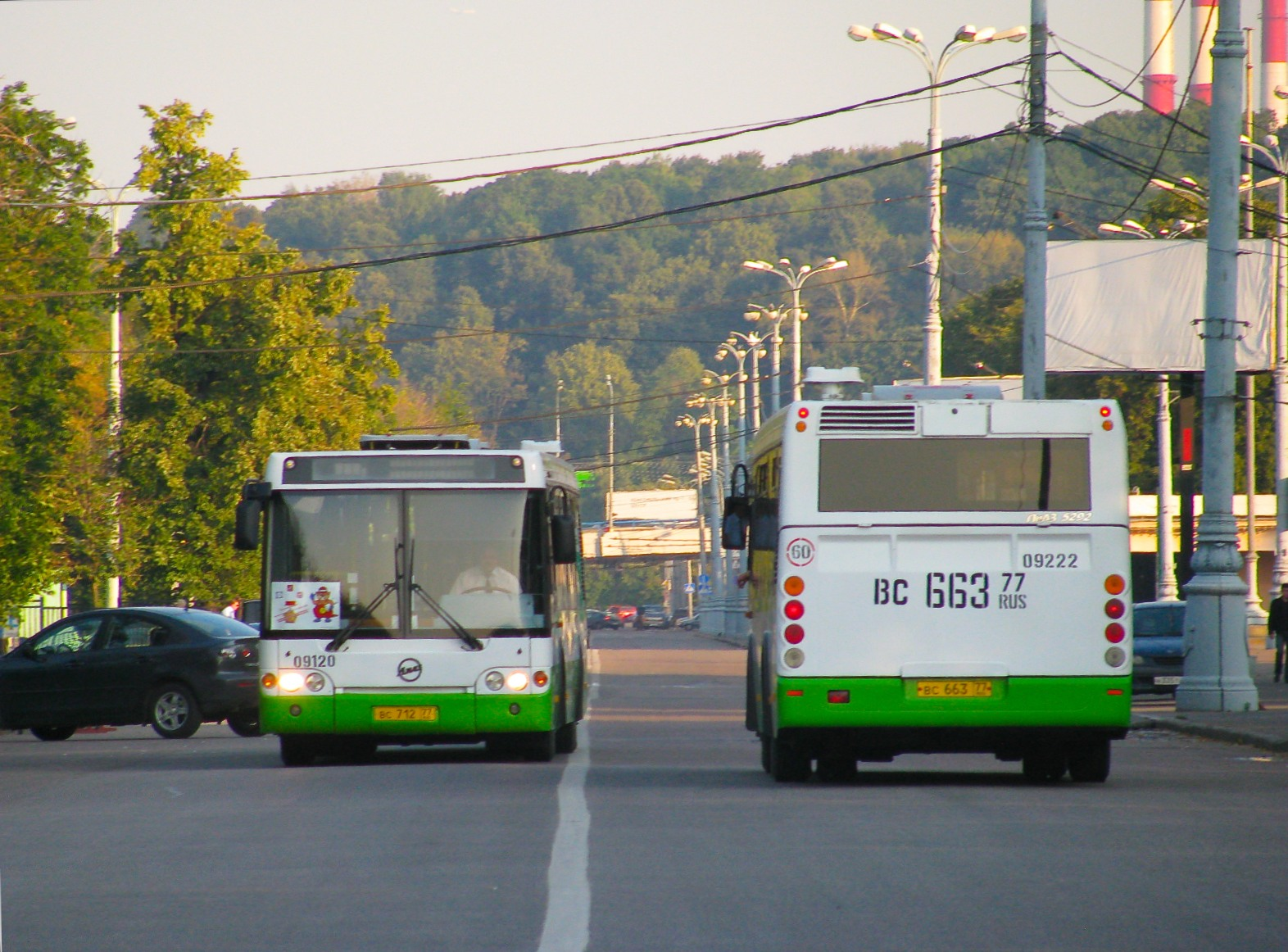 Автобусы ЛиАЗ 5292.20 №09120 и №09222 недалеко от центрального входа на Стадион "Лужники"